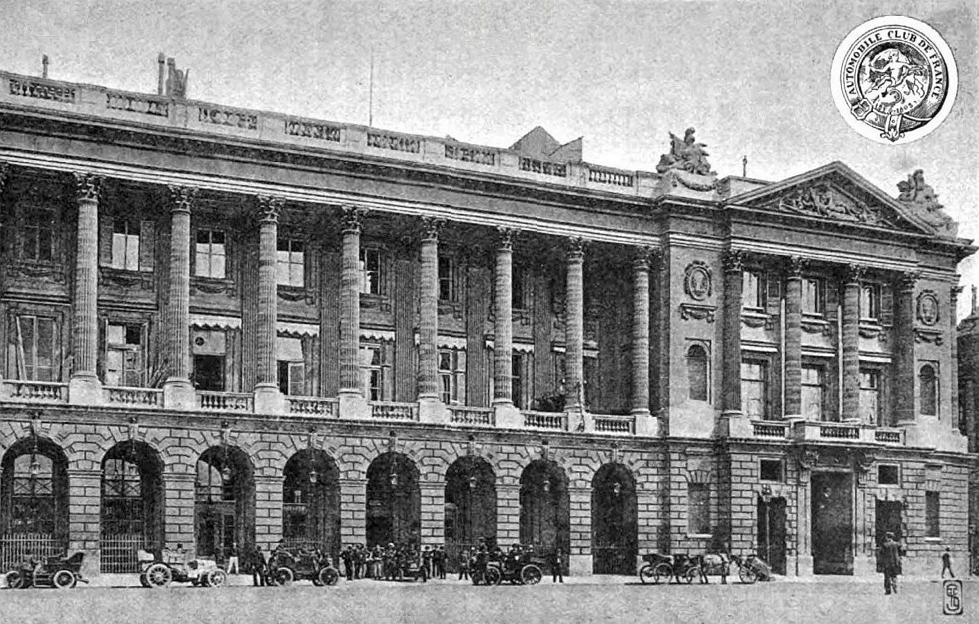 Façade de l'Automobile Club de France en 1900 depuis la place de la Concorde